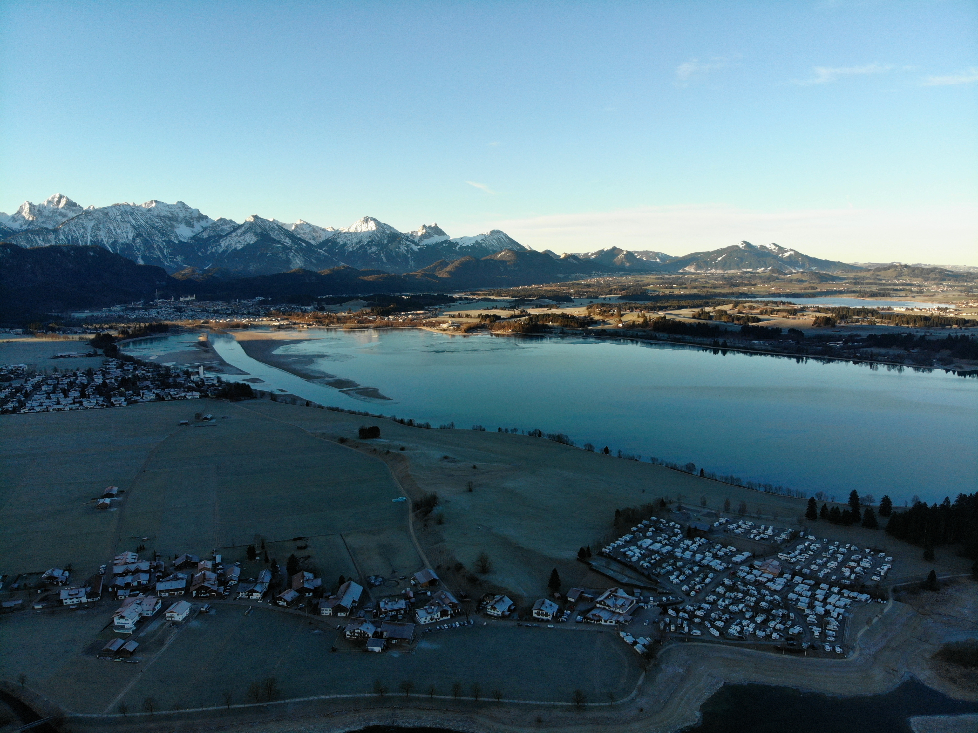 Brunnen mit Campingplatz Luftaufnahme